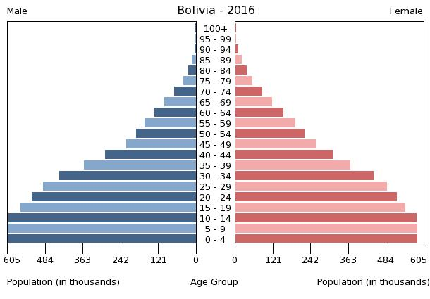 A population pyramid illustrates the age and sex structure of a country's population and may provide insights about political and social stability, as well as economic development. The population is distributed along the horizontal axis, with males shown on the left and females on the right. The male and female populations are broken down into 5-year age groups represented as horizontal bars along the vertical axis, with the youngest age groups at the bottom and the oldest at the top. The shape of the population pyramid gradually evolves over time based on fertility, mortality, and international migration trends.